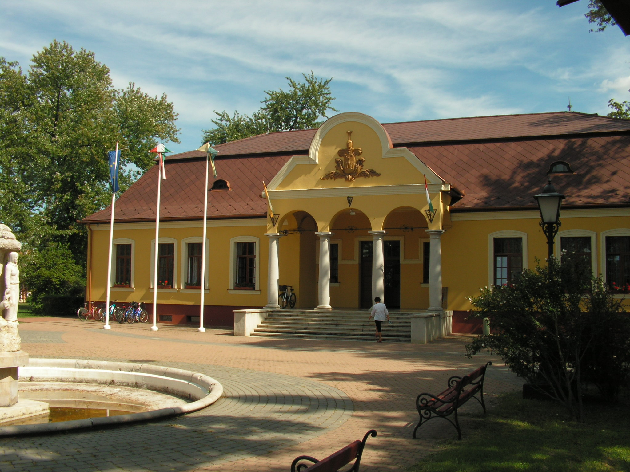 Magyarország, Gyömrő, a Városháza